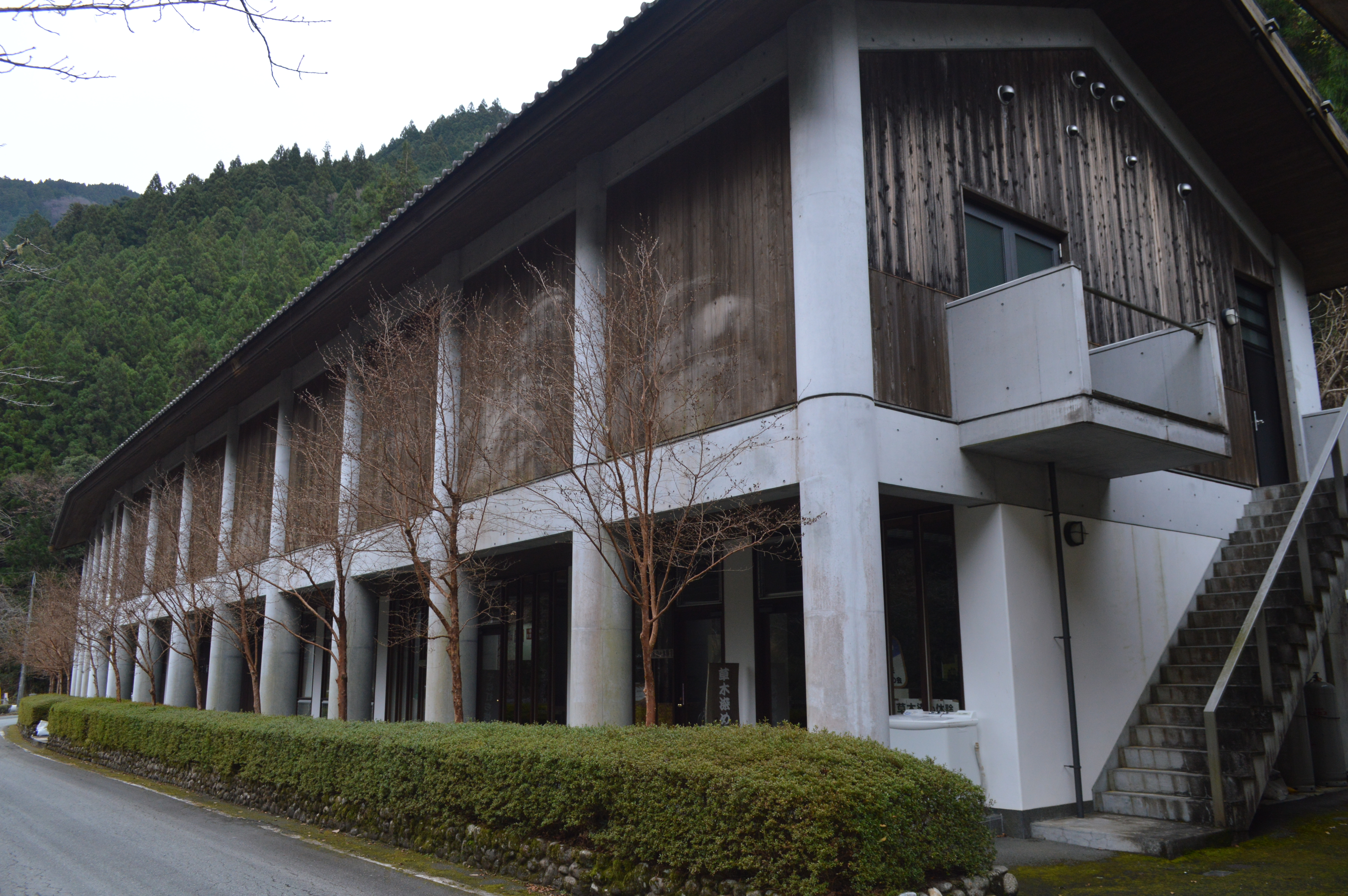 静岡県浜松市天竜区水窪町にある浜松市水窪民俗資料館。